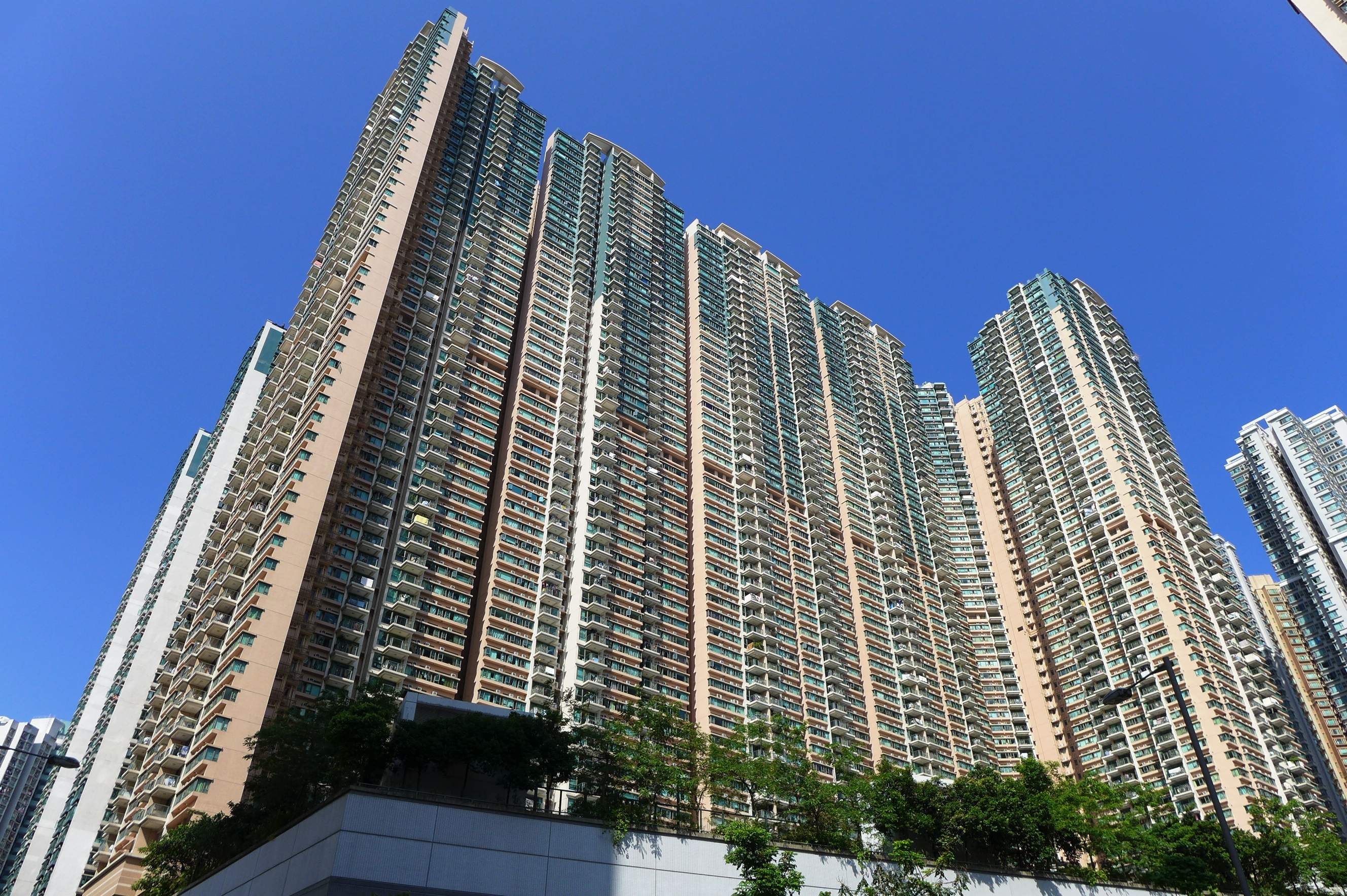 Residence Oasis